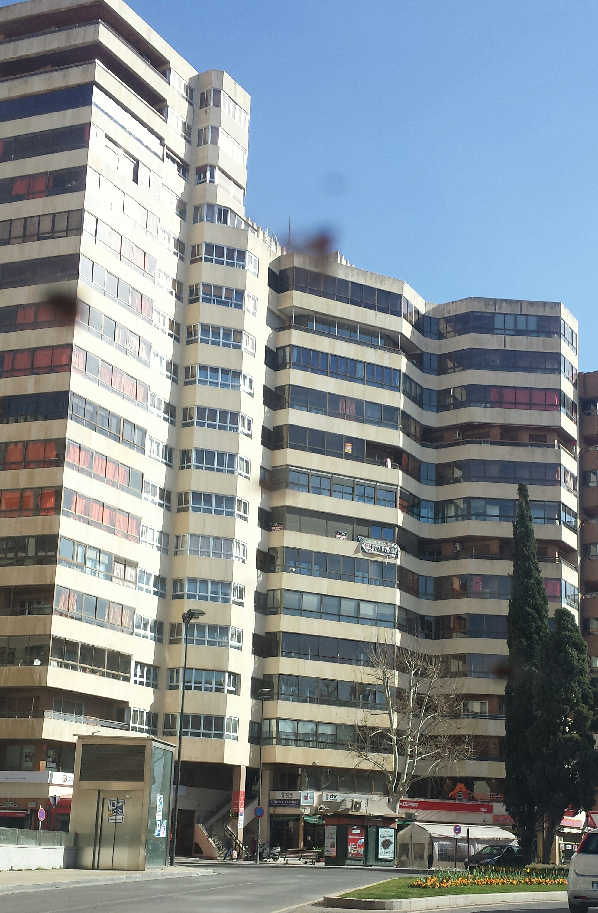 Edificio Forestal